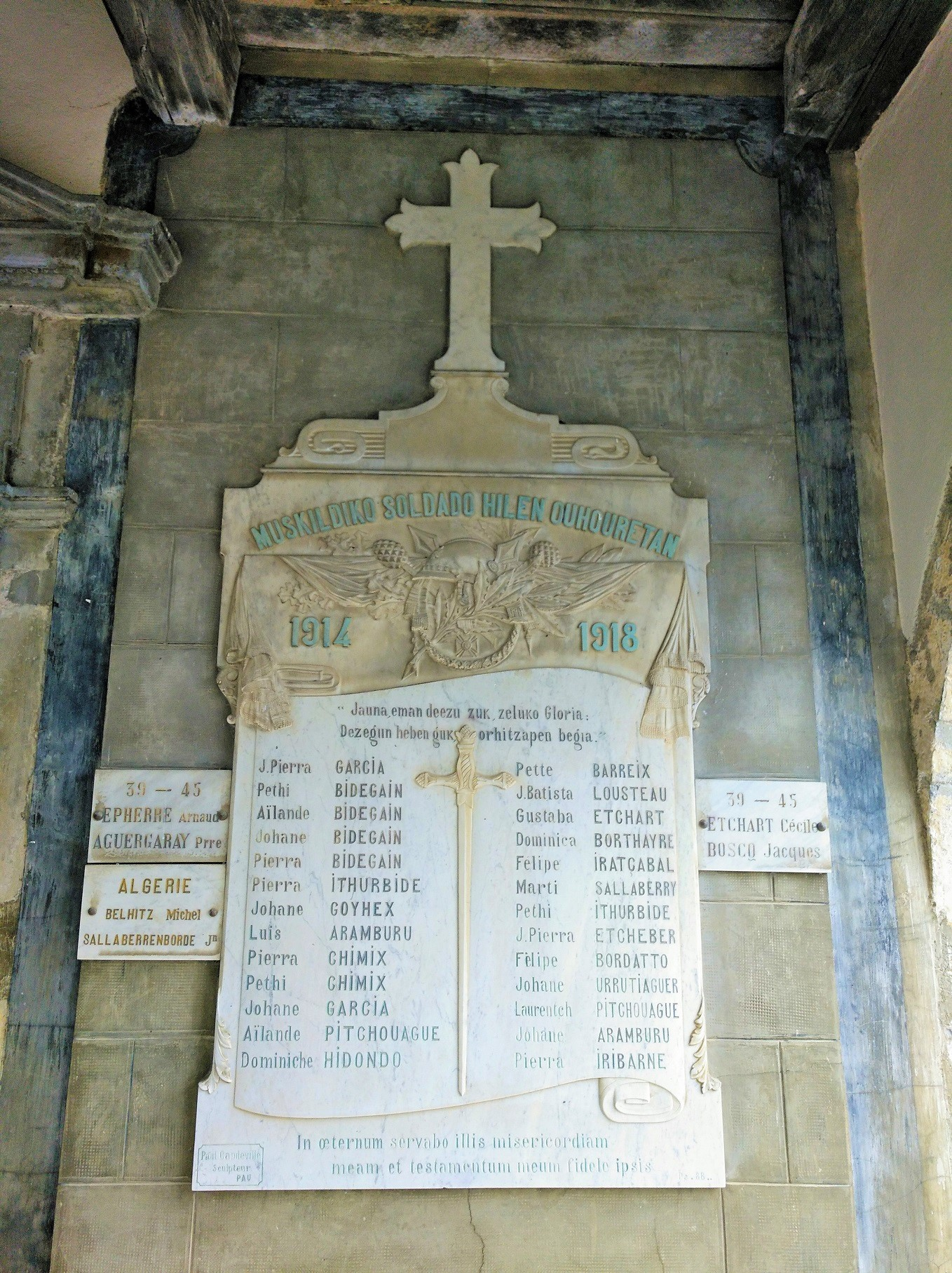 Gerla Handian hildakoen omenezko oroitarria, Muskildiko elizan (Zuberoa)